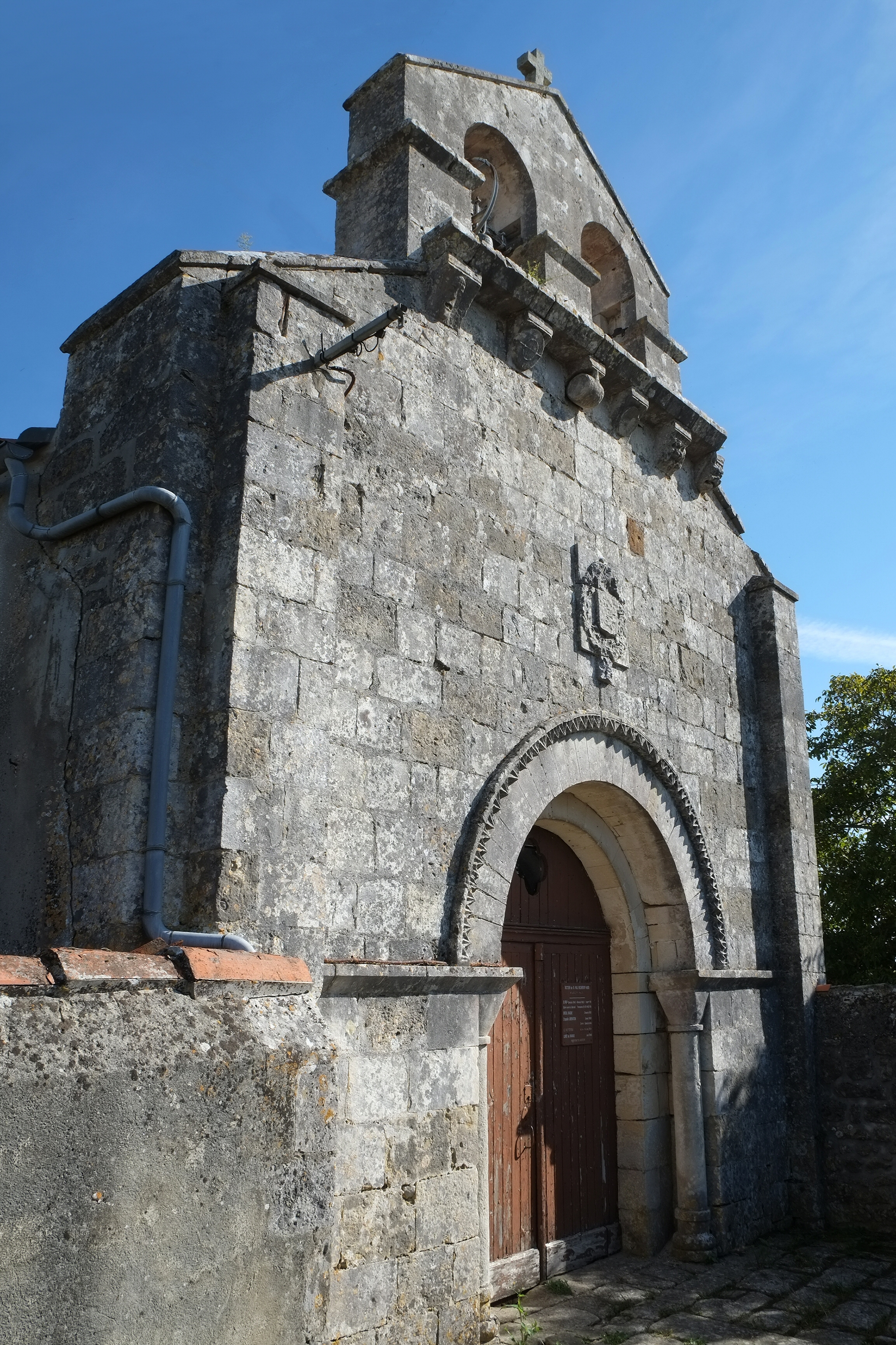 Église Saint-Vivien Vergeroux Charente-Maritime France